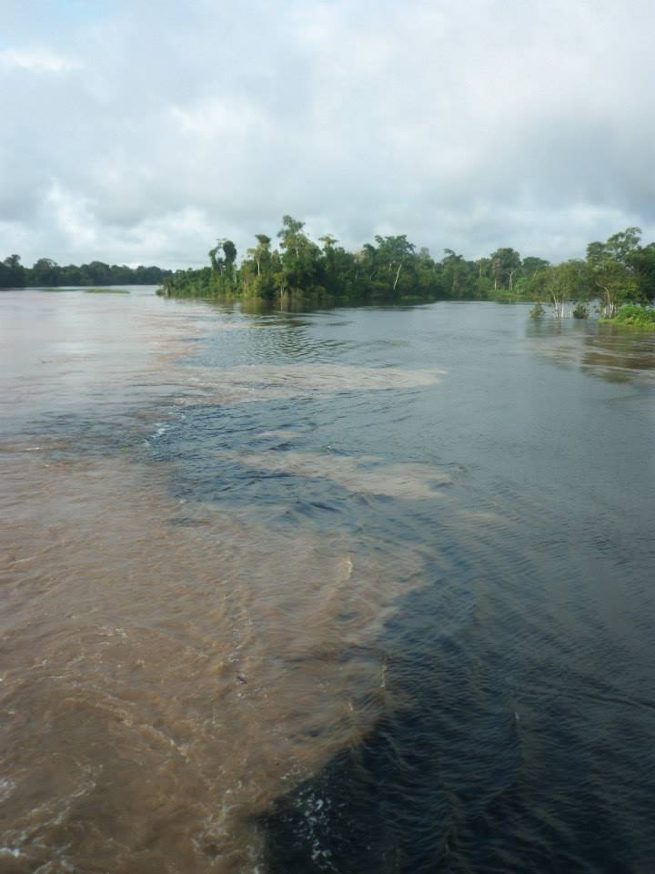 Encuentro de aguas del río Negro con el río Solimões, asi es llamado el río Amazonas en Brasil.